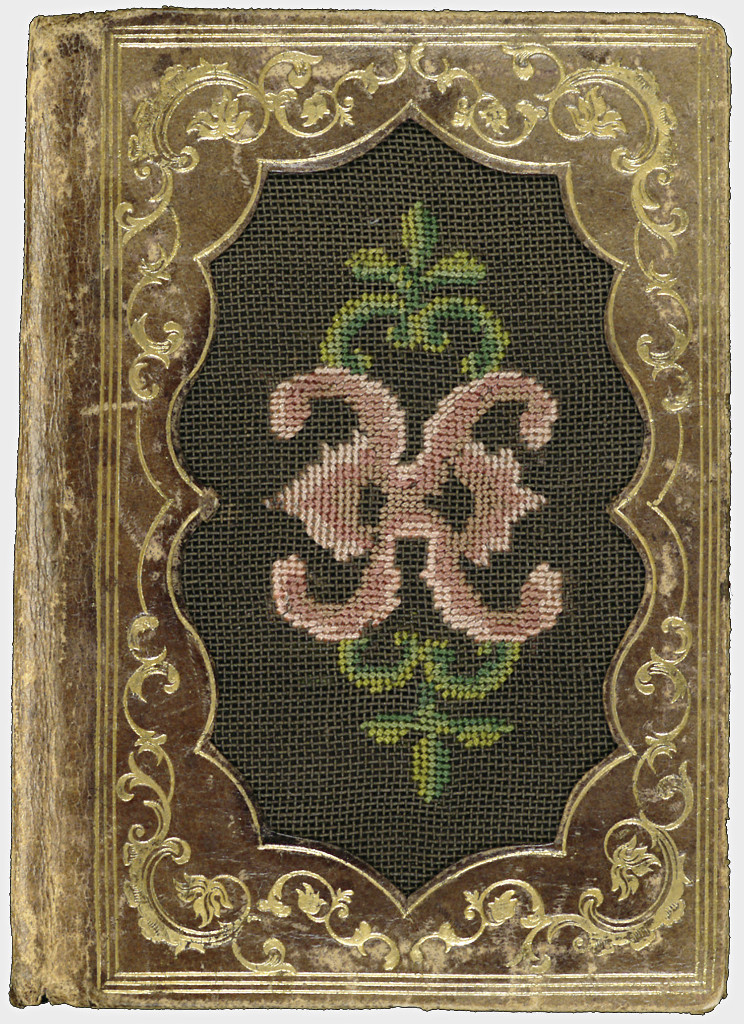 Inhoud: [Blanco katern, voor het maken van aantekeningen?].